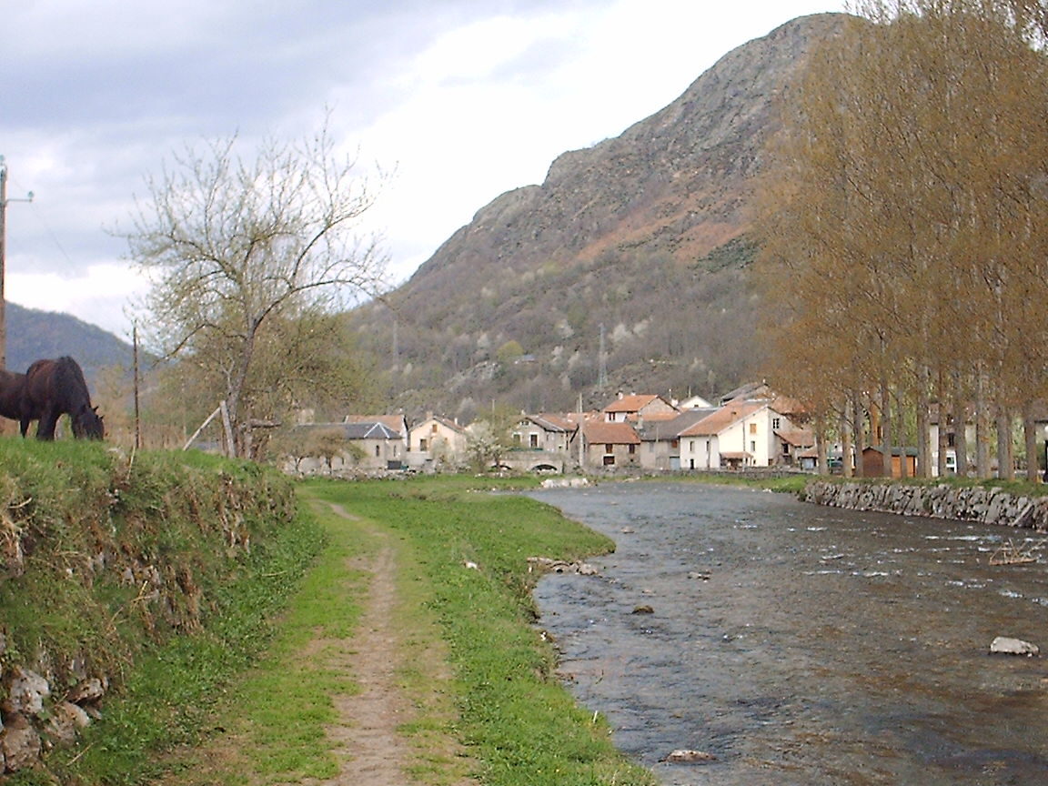 Orgeix vist des del camí d'Orlú